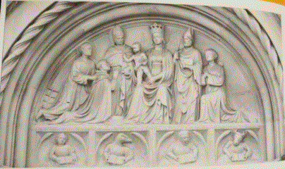 alla base dell'arco i simboli dei 4 evangelisti